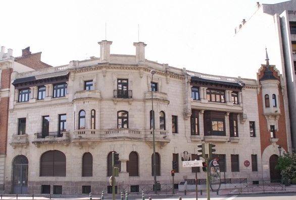 Palacete de D. Miguel Maura Gamazo. Paseo de Eduardo Dato 16, plaza de Rubén Darío 4. Obra de 1919.